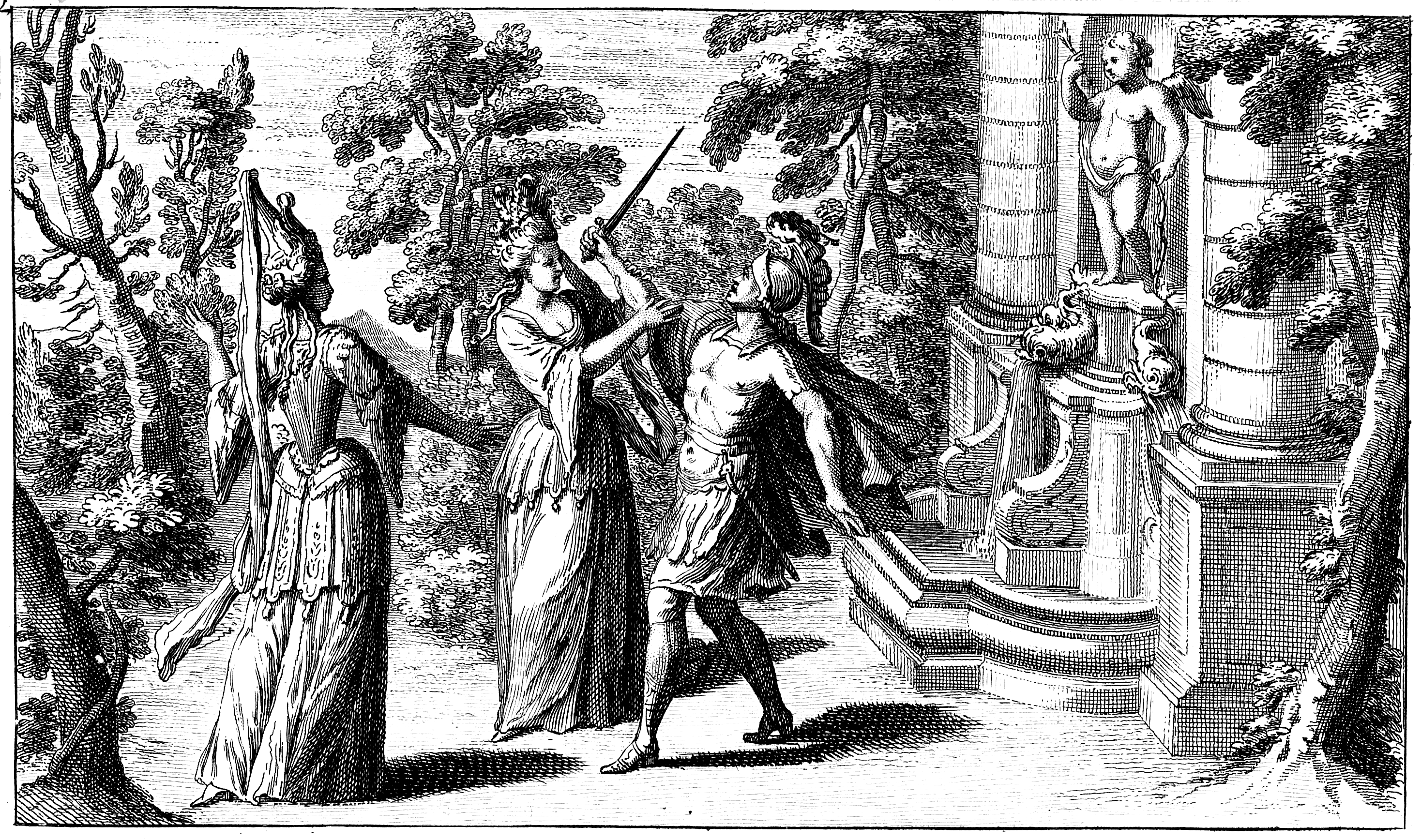 Jean-Baptiste Lully - Roland - Acte 2 - La Fontaine enchantée de l'Amour - Paris 1685